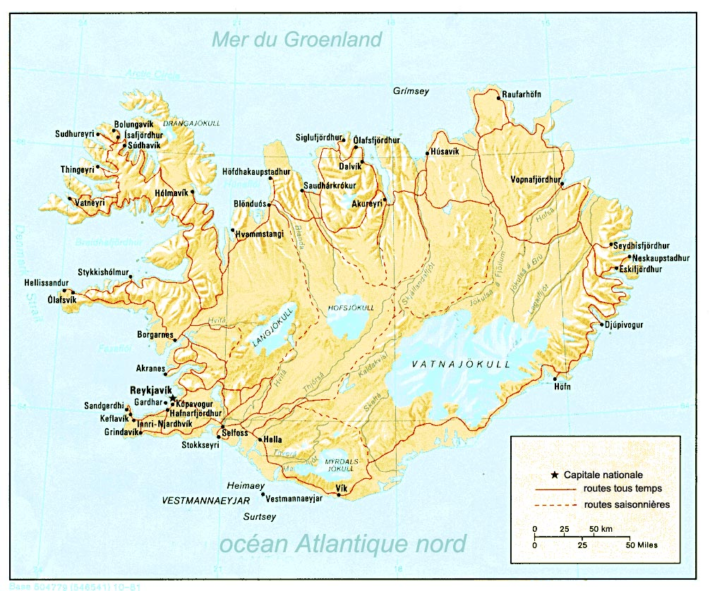 carte physique de l'Islande